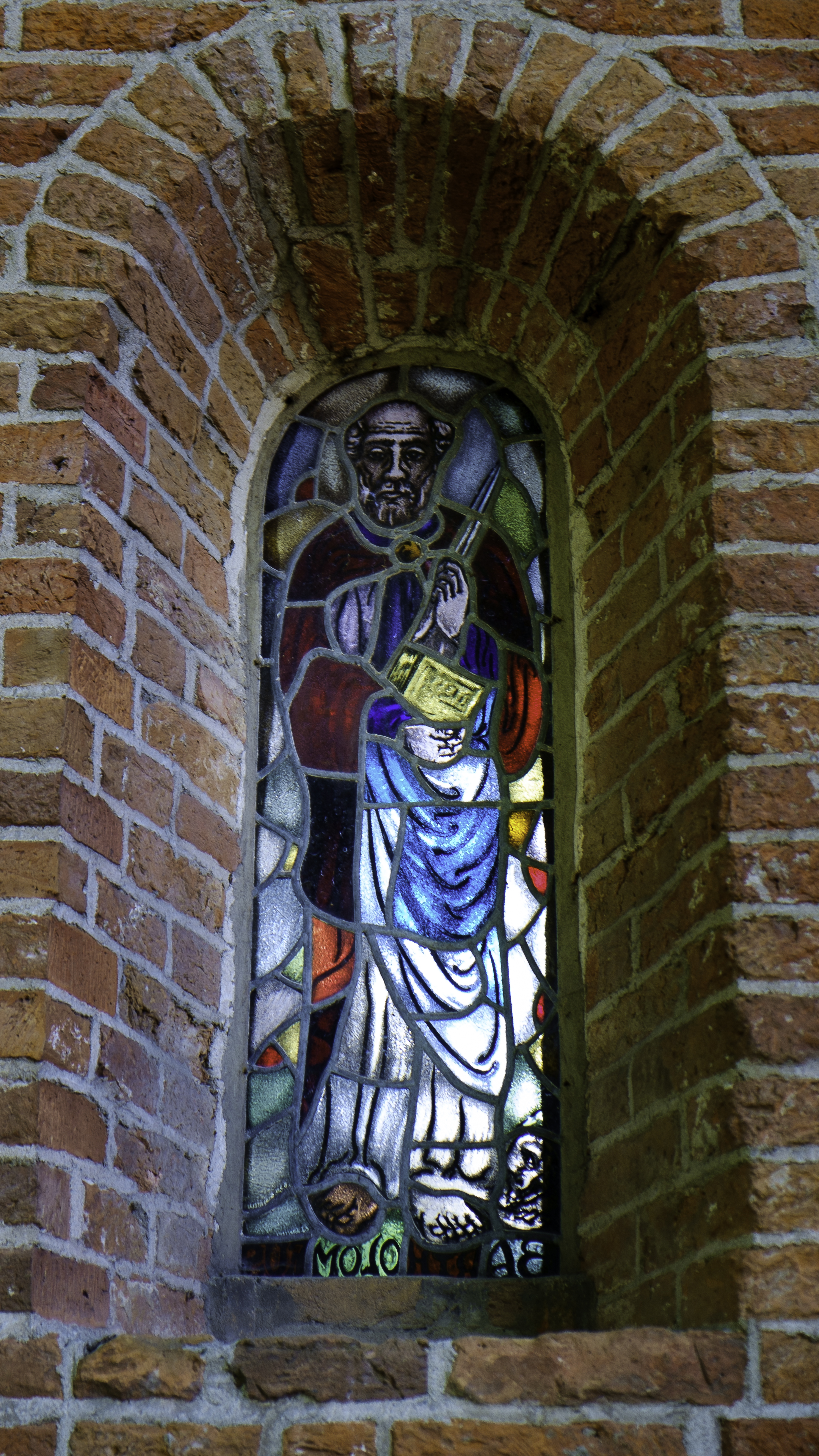 Gebrandschilderd glas met de afbeelding van Bartholomeüs in het noordvenster in het koor van de Bartholomeüskerk in Noordlaren